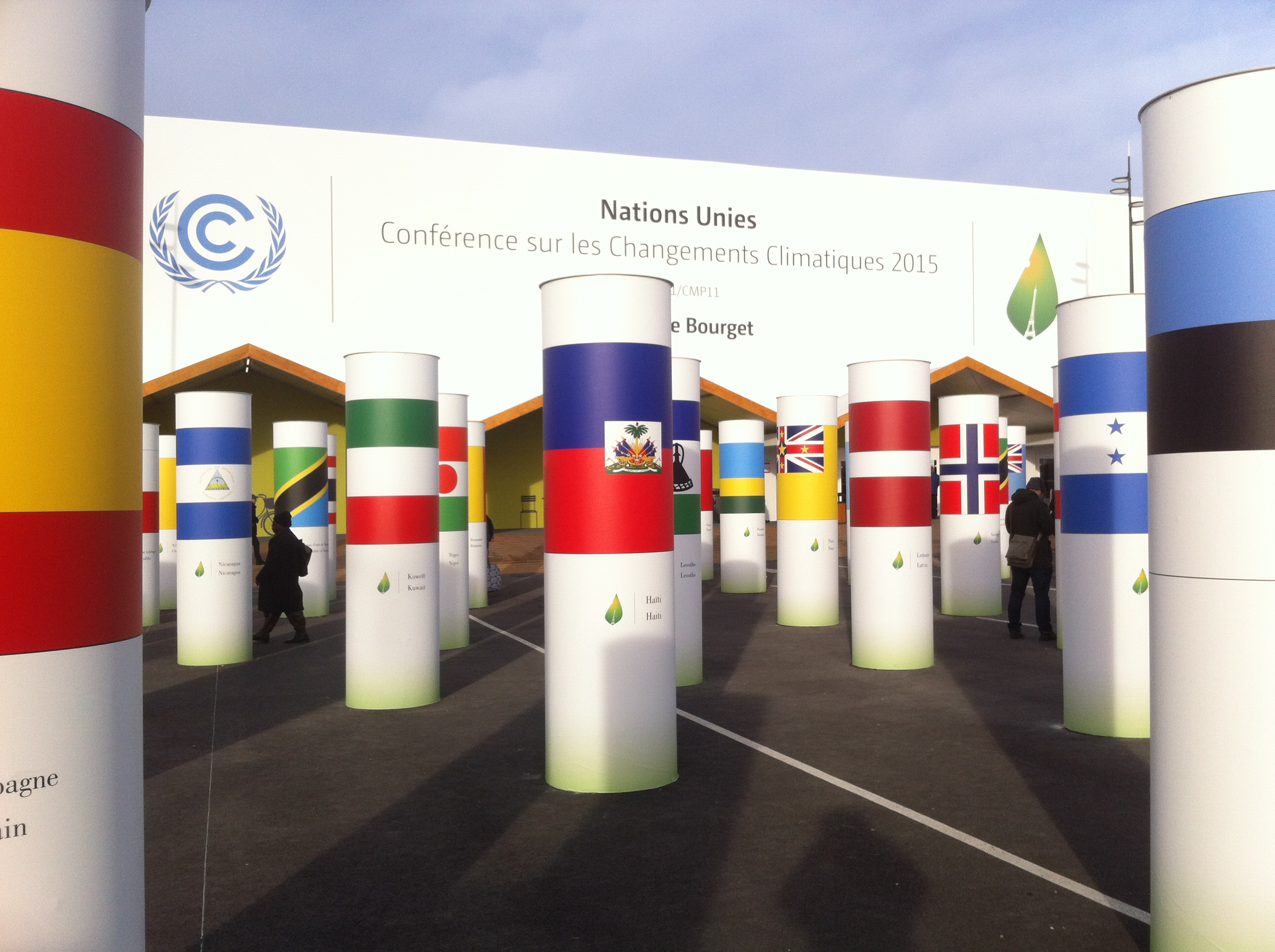 Vue extérieure du hall des négociations de la COP21 sur le site du parc des expositions du Bourget.